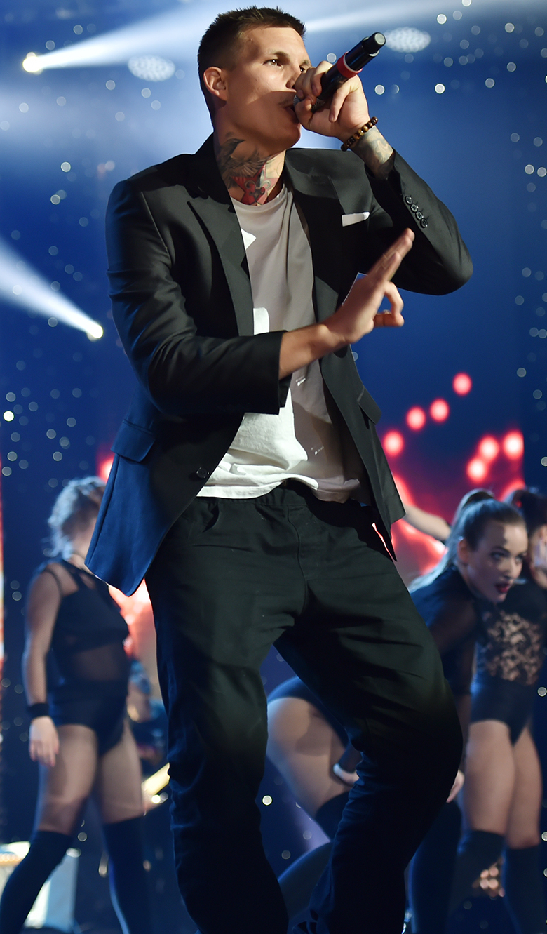 Vladis